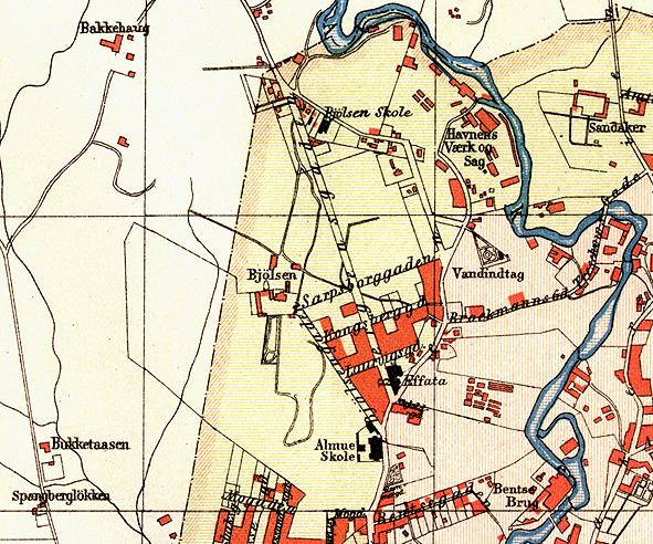 Kart over Bjølsen, 1887